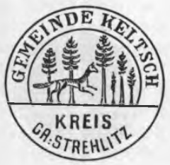 Altes Siegel bzw. Stempel der Gemeinde Keltsch im Kreis Groß Strehlitz.